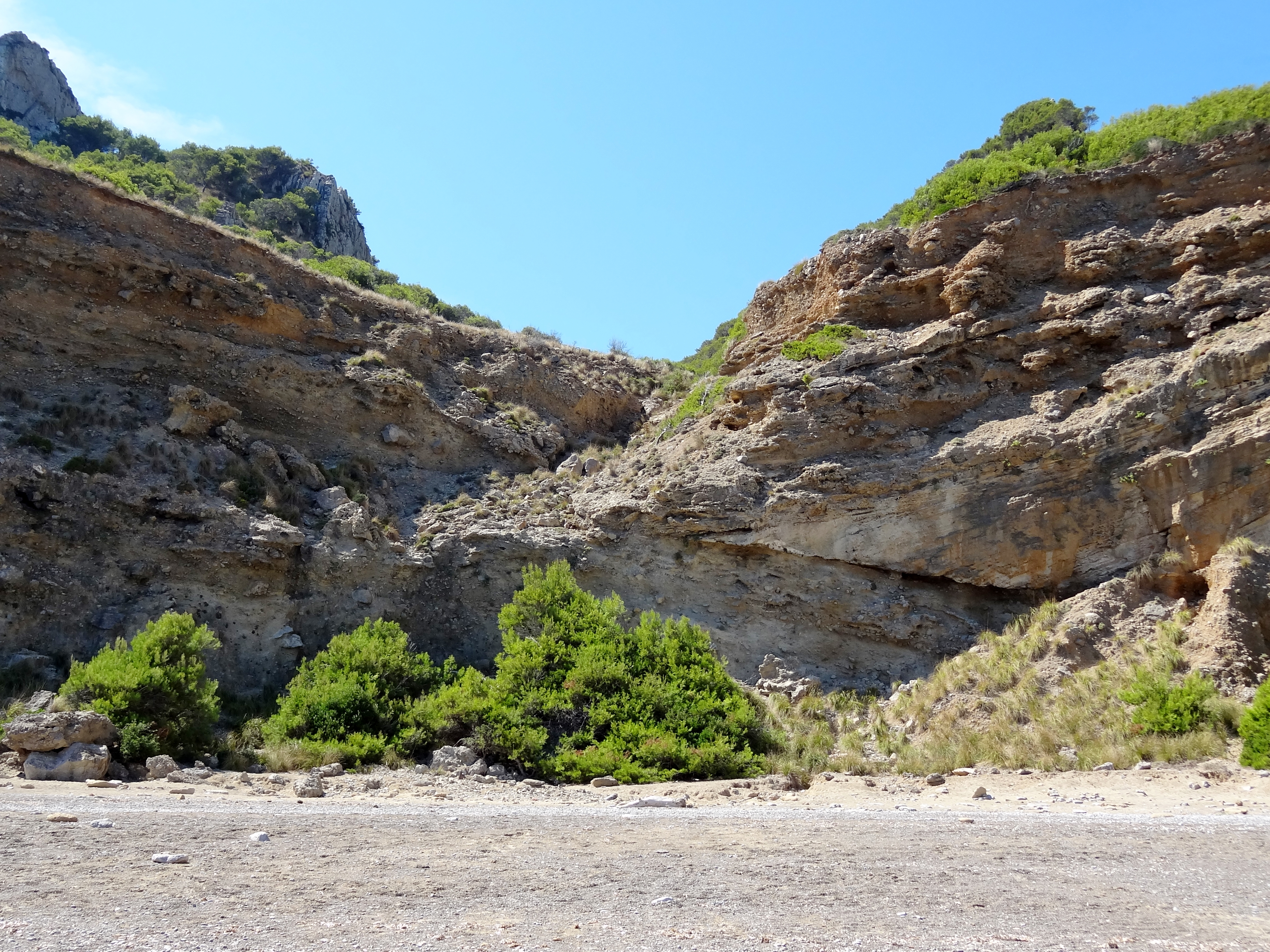 Platja des Coll Baix, Strand auf der Halbinsel Victòria in der Gemeinde Alcúdia, Mallorca, Spanien